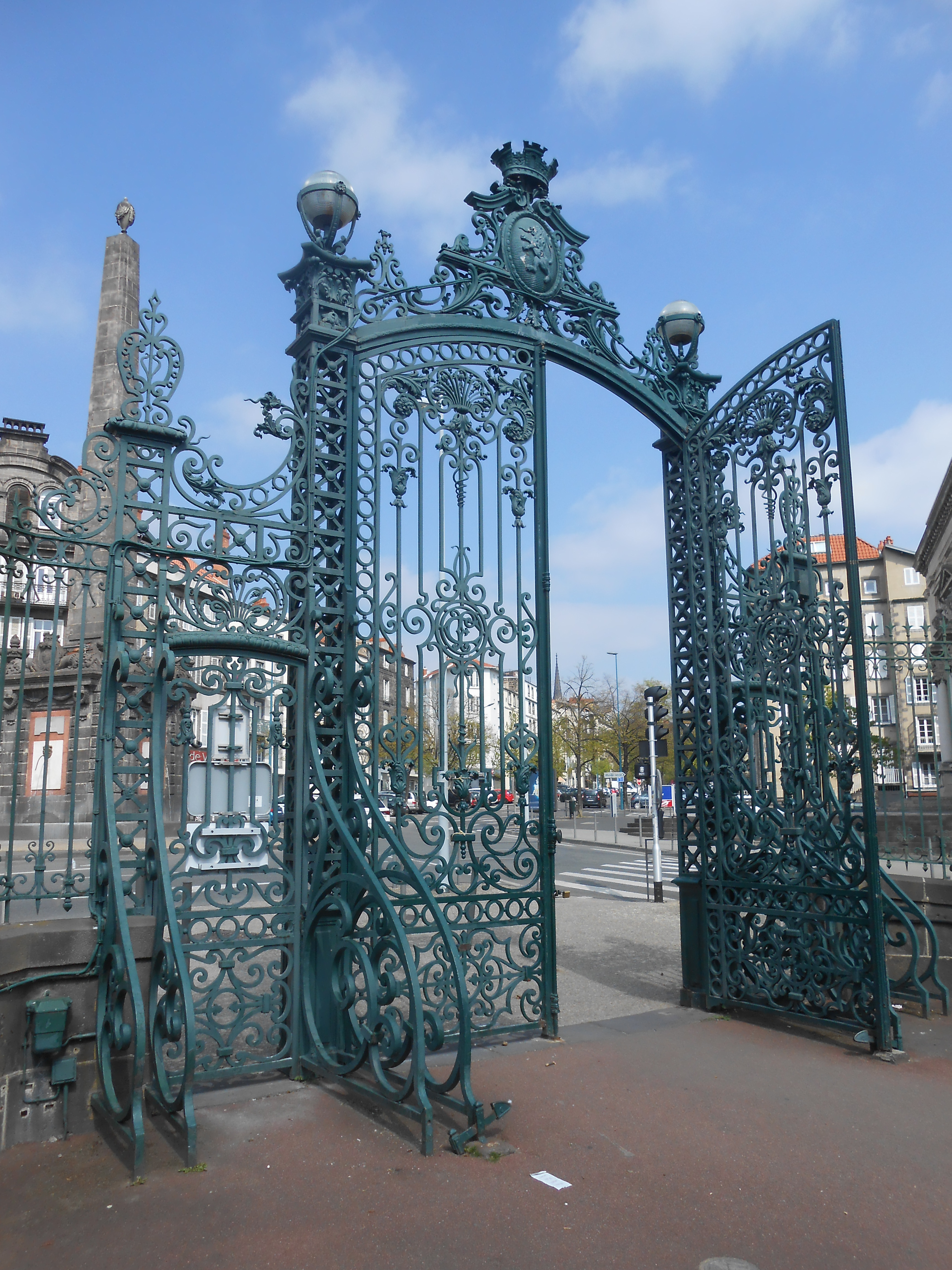 Portail Jardin Lecoq - quartier de Ballainvilliers, Clermont-Ferrand, Auvergne.